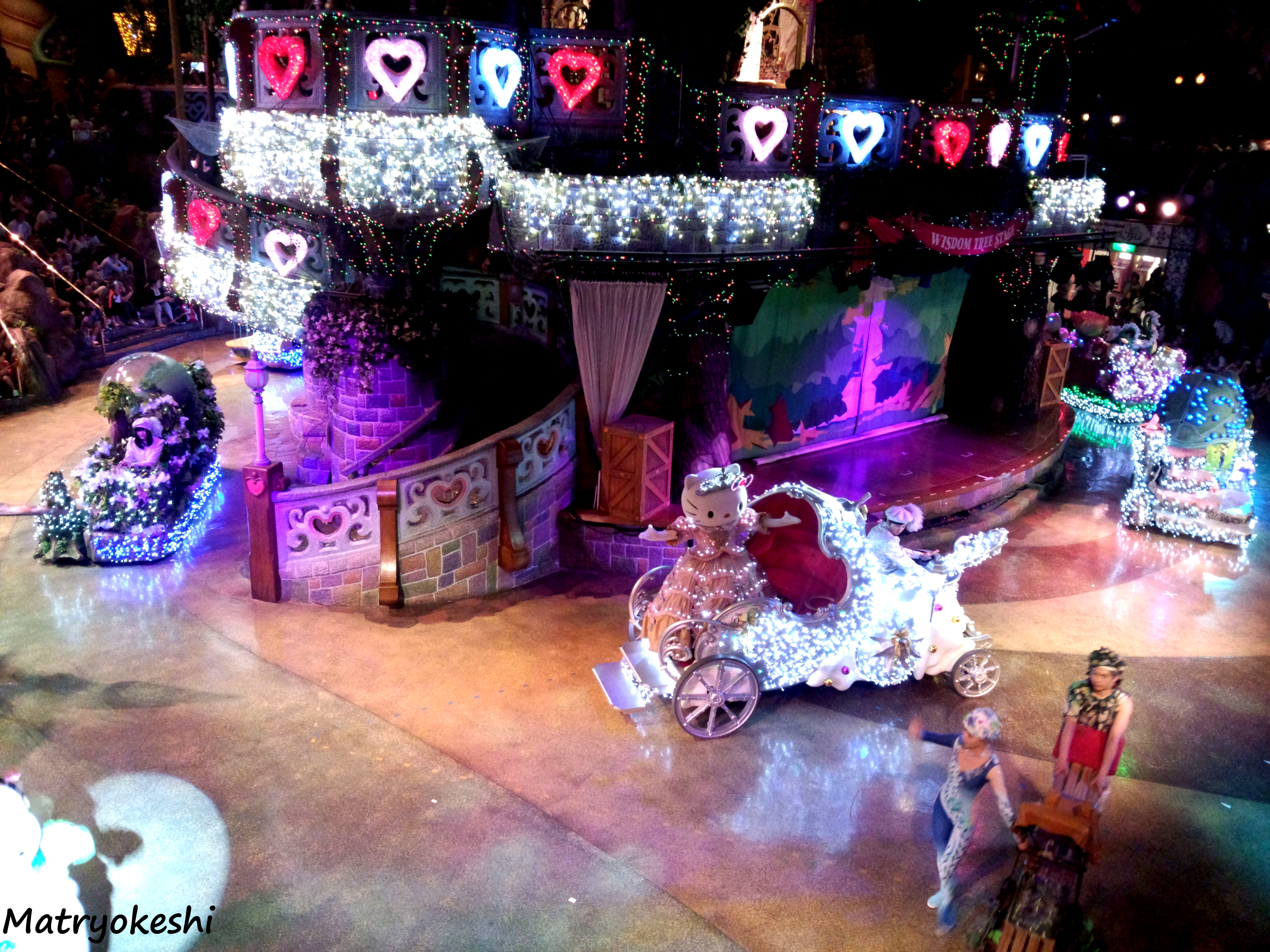 Hello Kitty во время парада в Sanrio Puroland